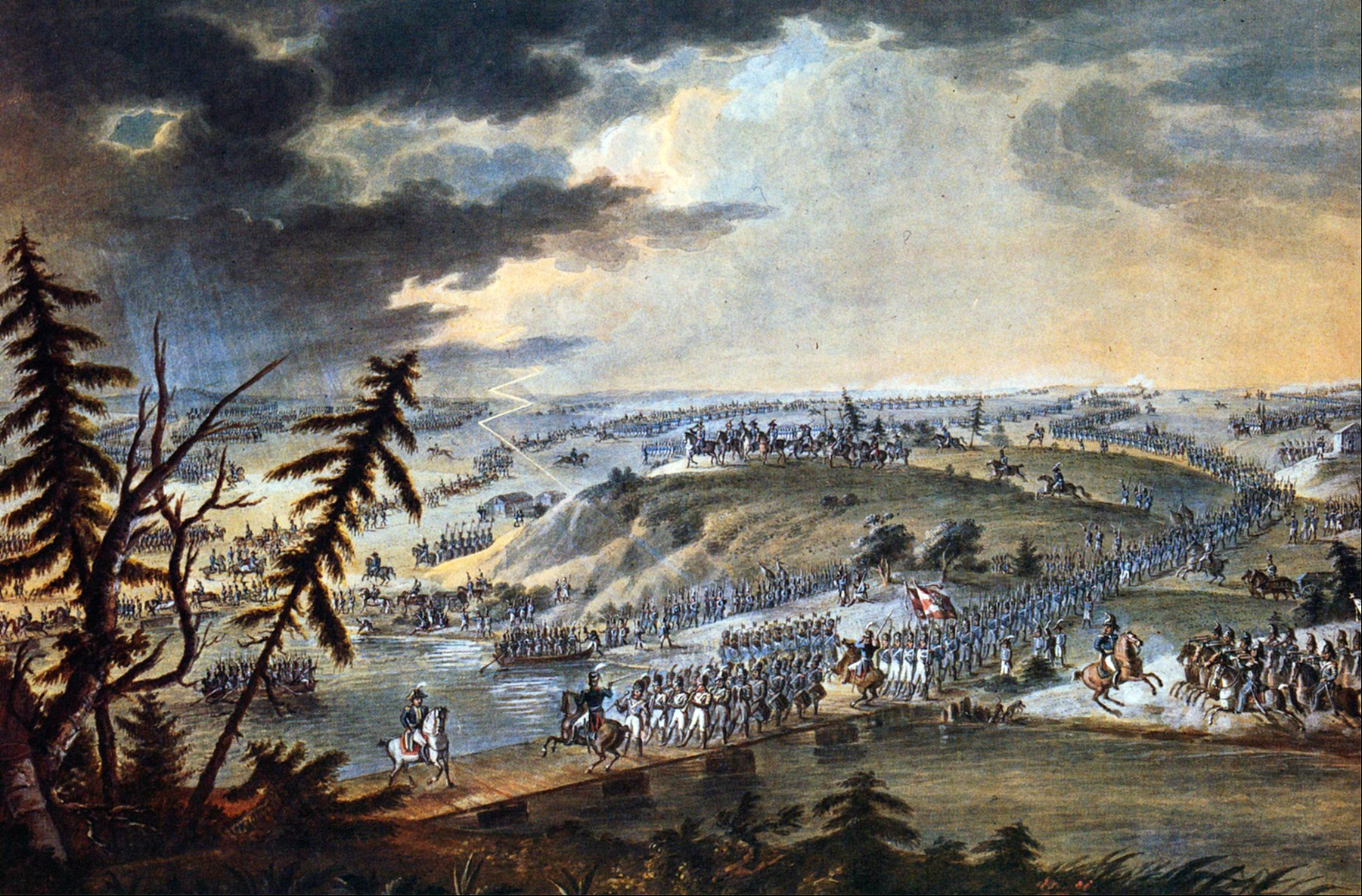 Переправа наполеоновской армии через Неман Картина неизвестного художника "Переправа наполеоновской армии через Неман", 1810-е гг. Бумага, акварель, 38x25.